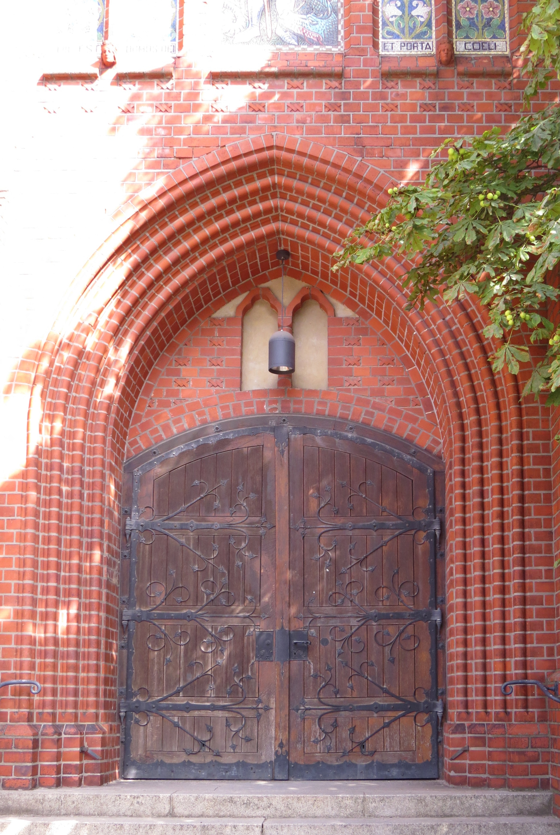 Kirche St. Georg, Berlin-Pankow, Hauptportal